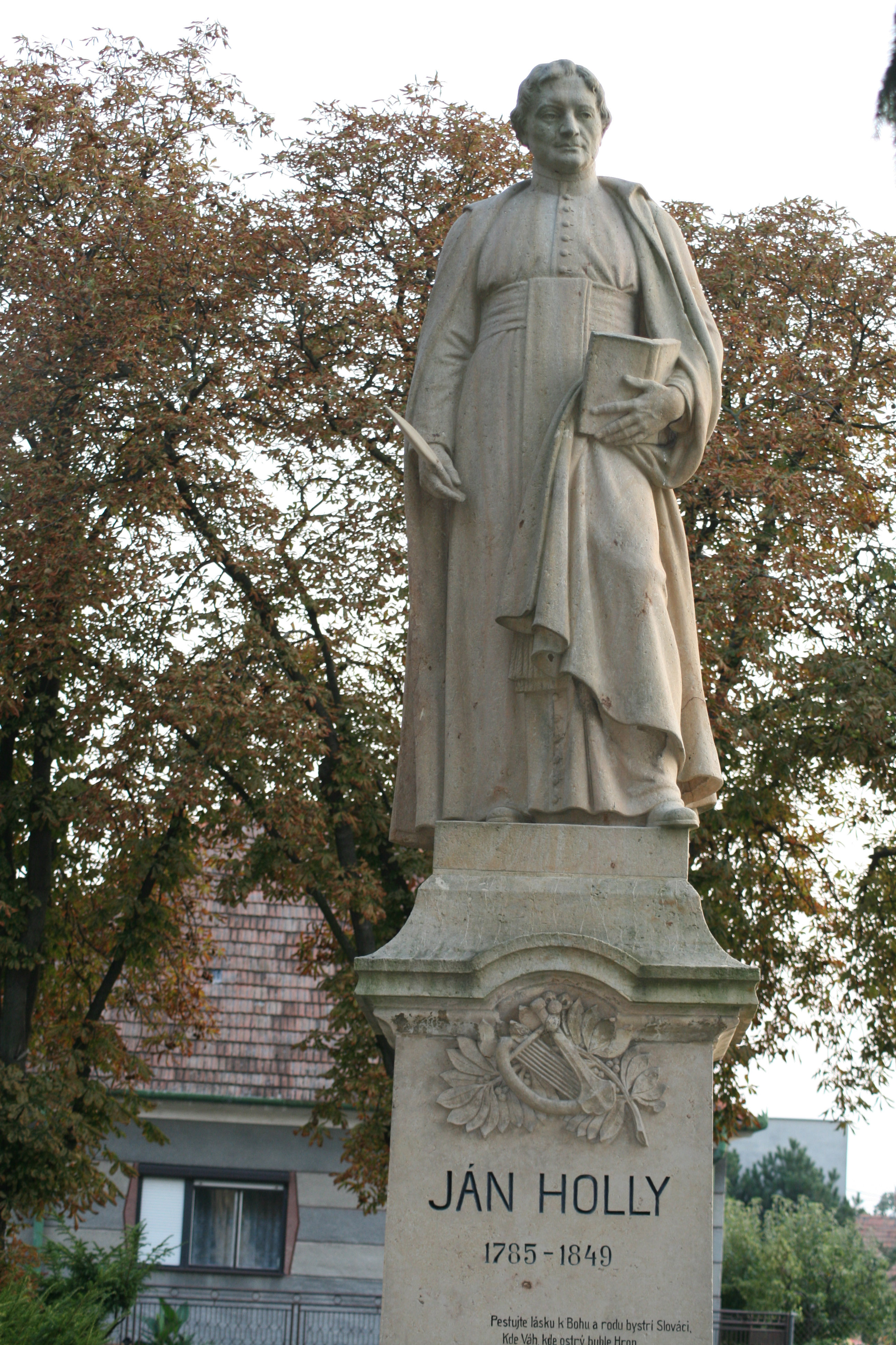 Pieskovcová skulptúra významnej postavy slovenských dejín Jána Hollého.